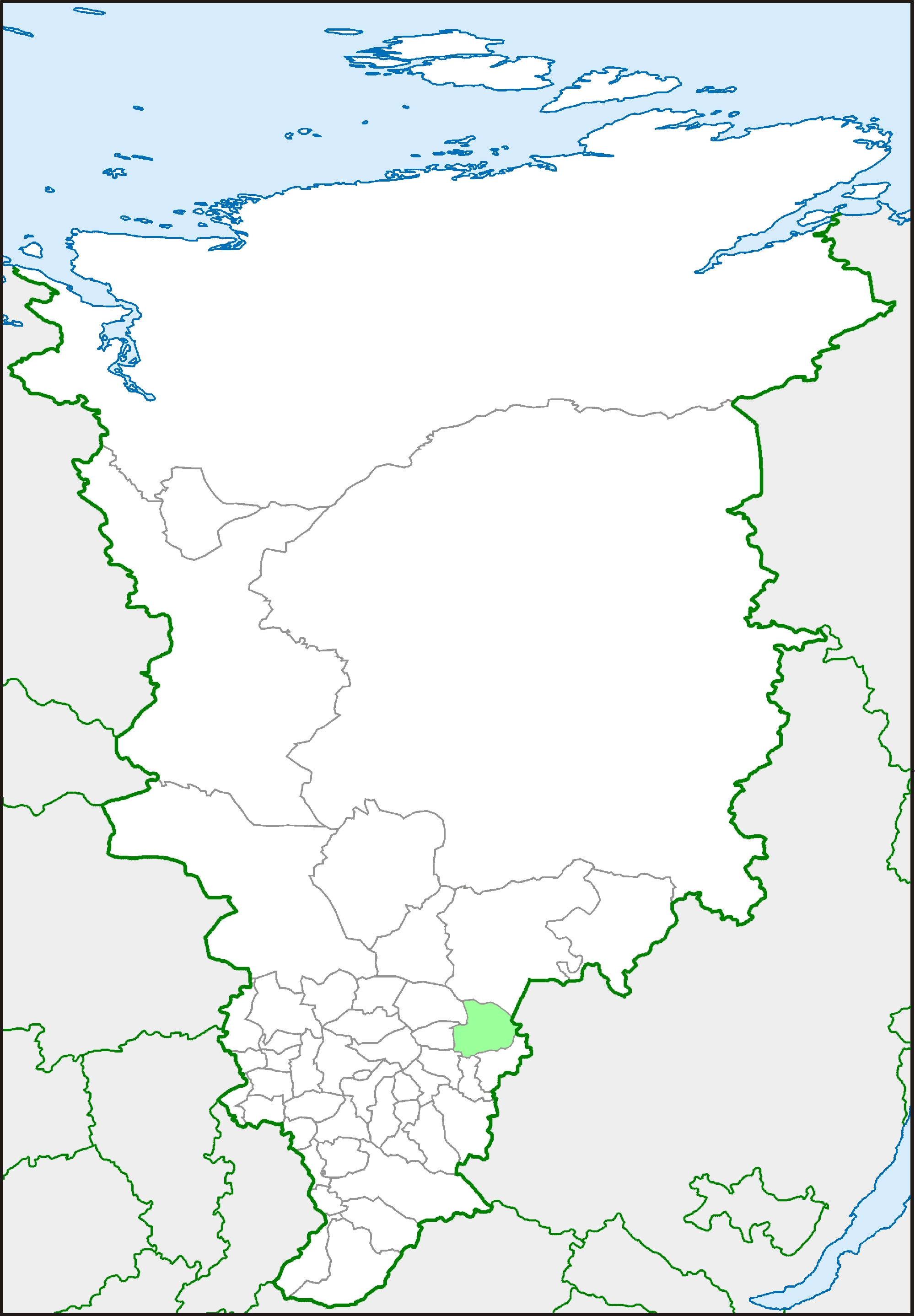 Абанский район на карте Красноярского края